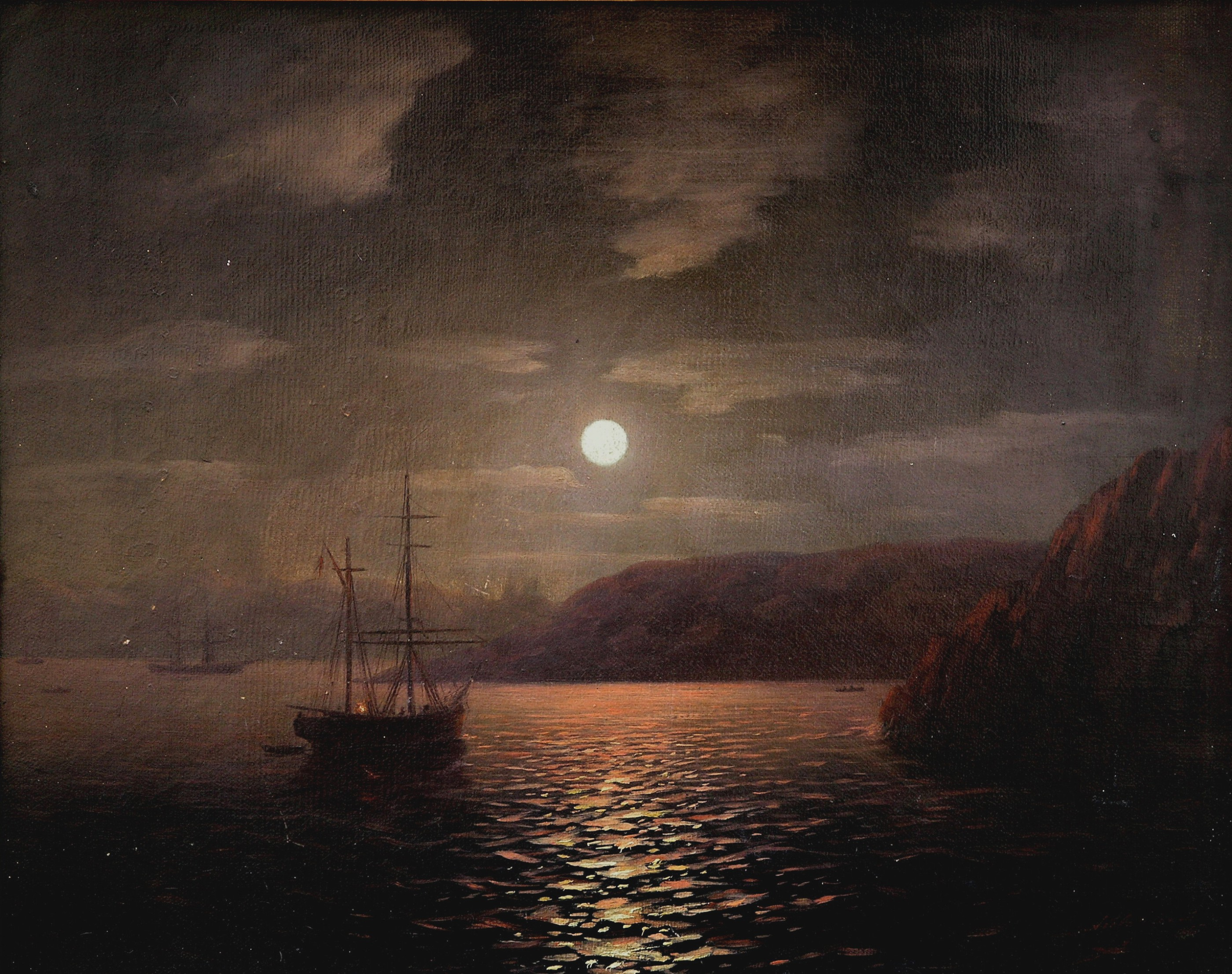 Лунная ночь на Черном море. 1855 Холст, масло.47х58см. КП-8835. Справа внизу: Айвазовскiй. Пост. в 1924 из музейного фонда, Москва Художественно-исторический музей им. А. В. Григорьева, Козьмодемьянск